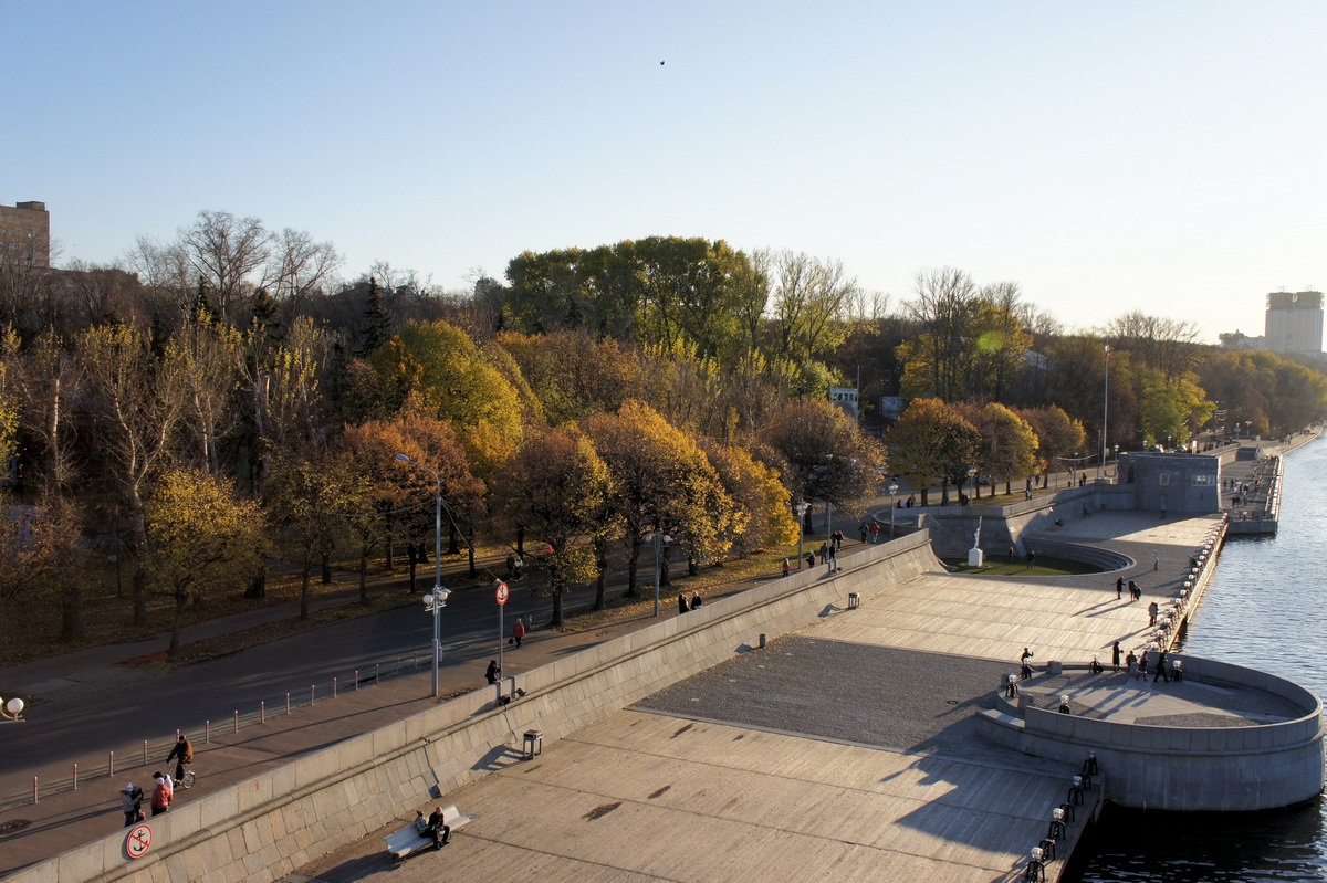 Вид на Нескучный сад с Андреевского моста.